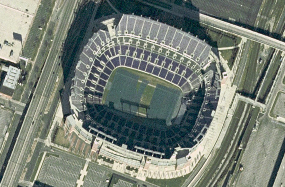 nasa world wind 1.3.5